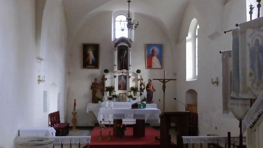 Prezbiterium